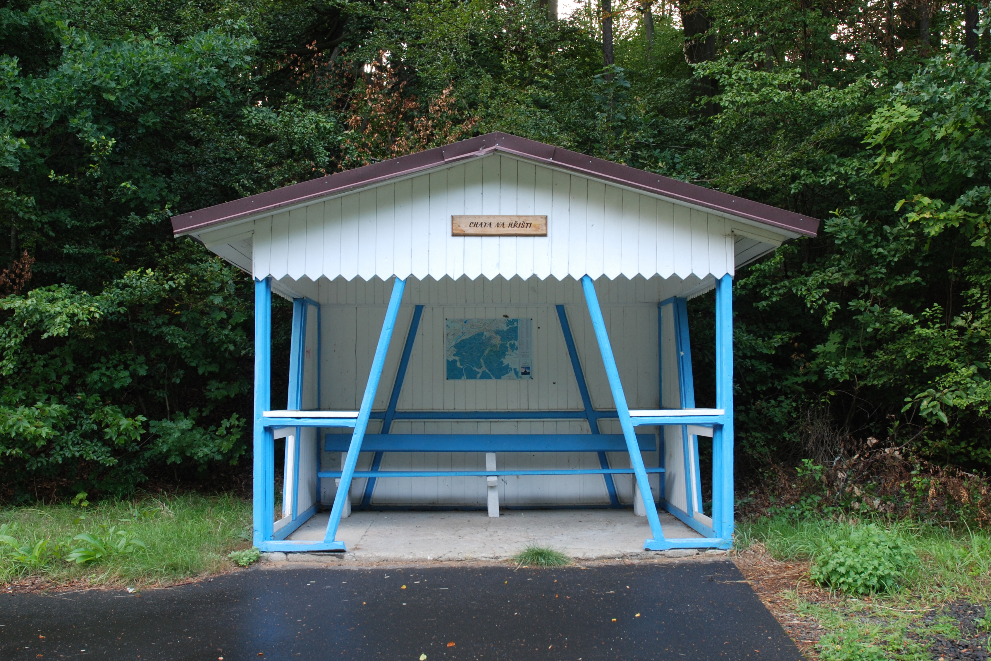 Chata Na Hřišti u Branaldovy cesty v karlovarských lázeňských lesích